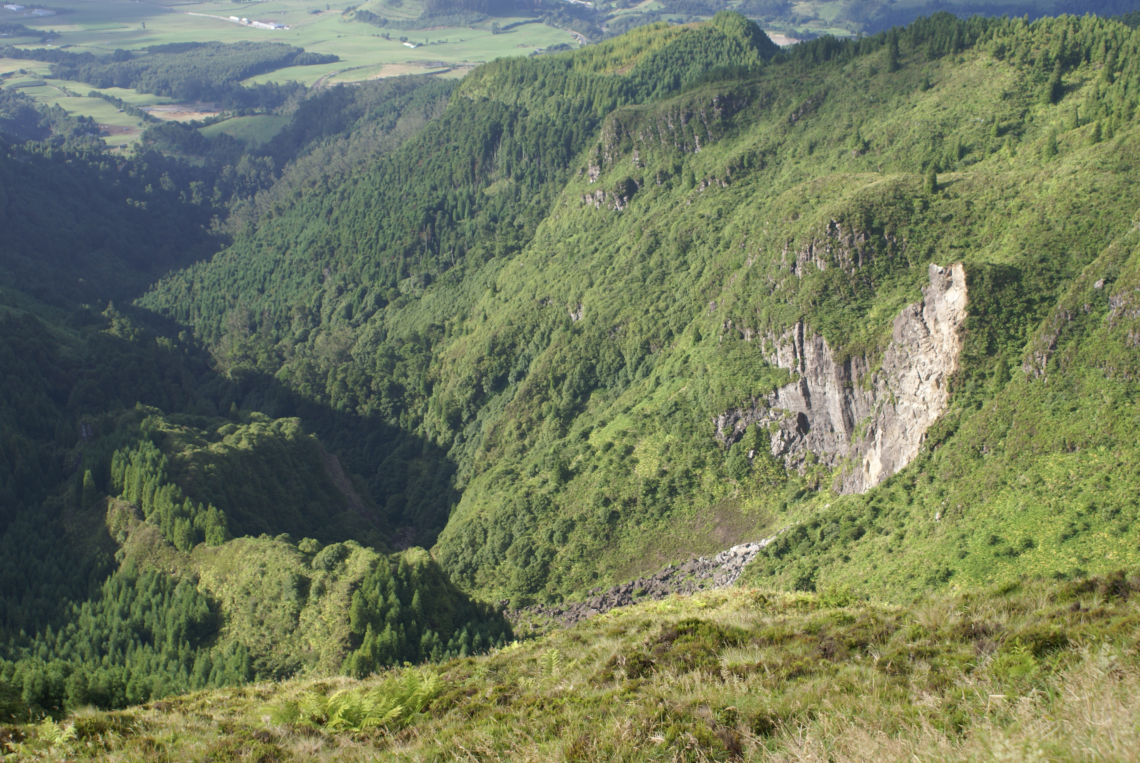 Paisagem do interior de São Miguel, a caminho da Lagoa do Fogo, ilha de São Miguel, Açores